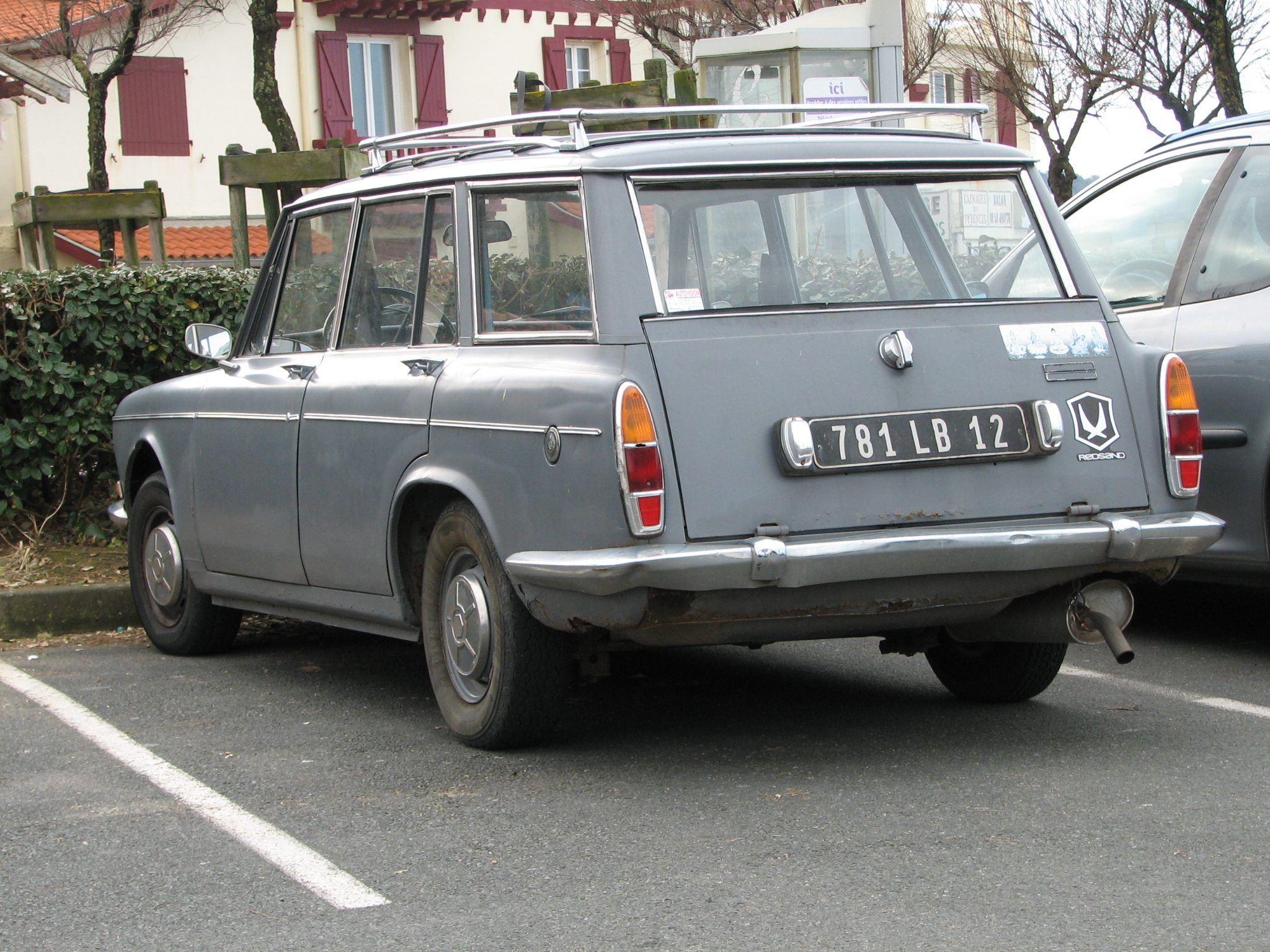 1973 Simca 1501 break